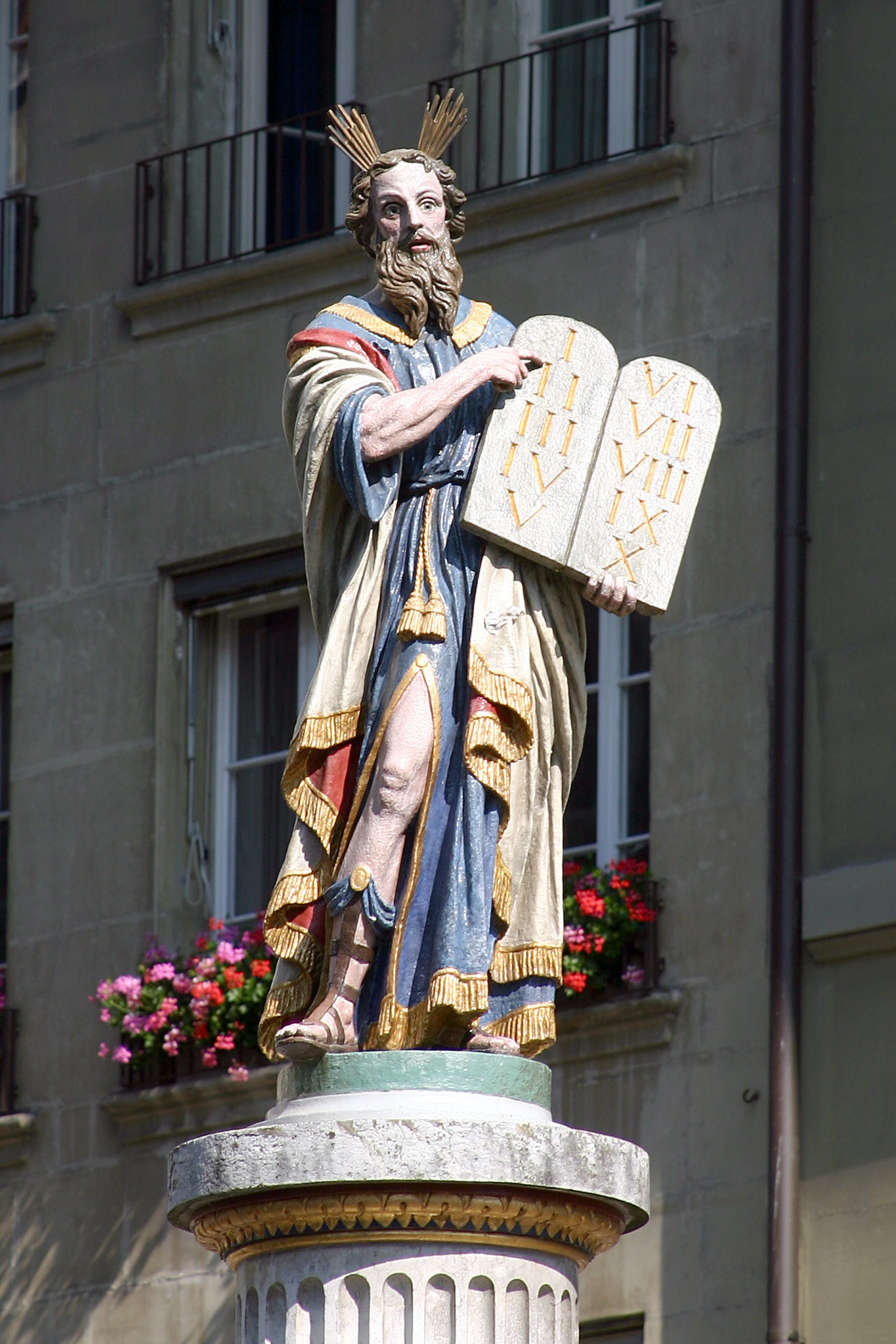 Mosesbrunnen, Bern, Switzerland